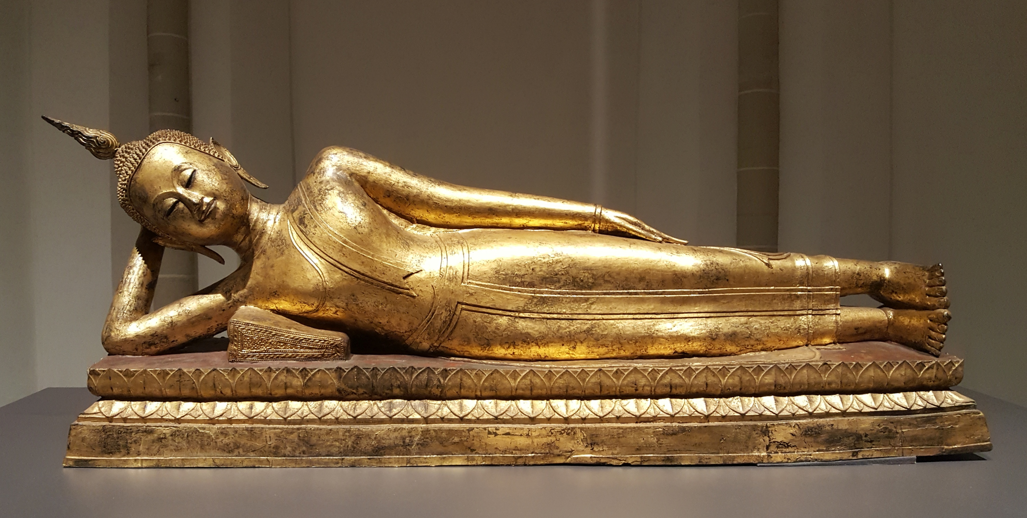 Een liggende Boeddha uit de vroege Bankok-periode in Thailand, Tweede Koninkrijk, 18de eeuw. Tentoongesteld in de Nieuwe Kerk te Amsterdam. De uitvoering is verguld brons (verloren was-methode). Ger Eenens Collectie / Wereldmuseum Rotterdam.